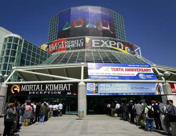 Centro de Convenciones de Los Ángeles